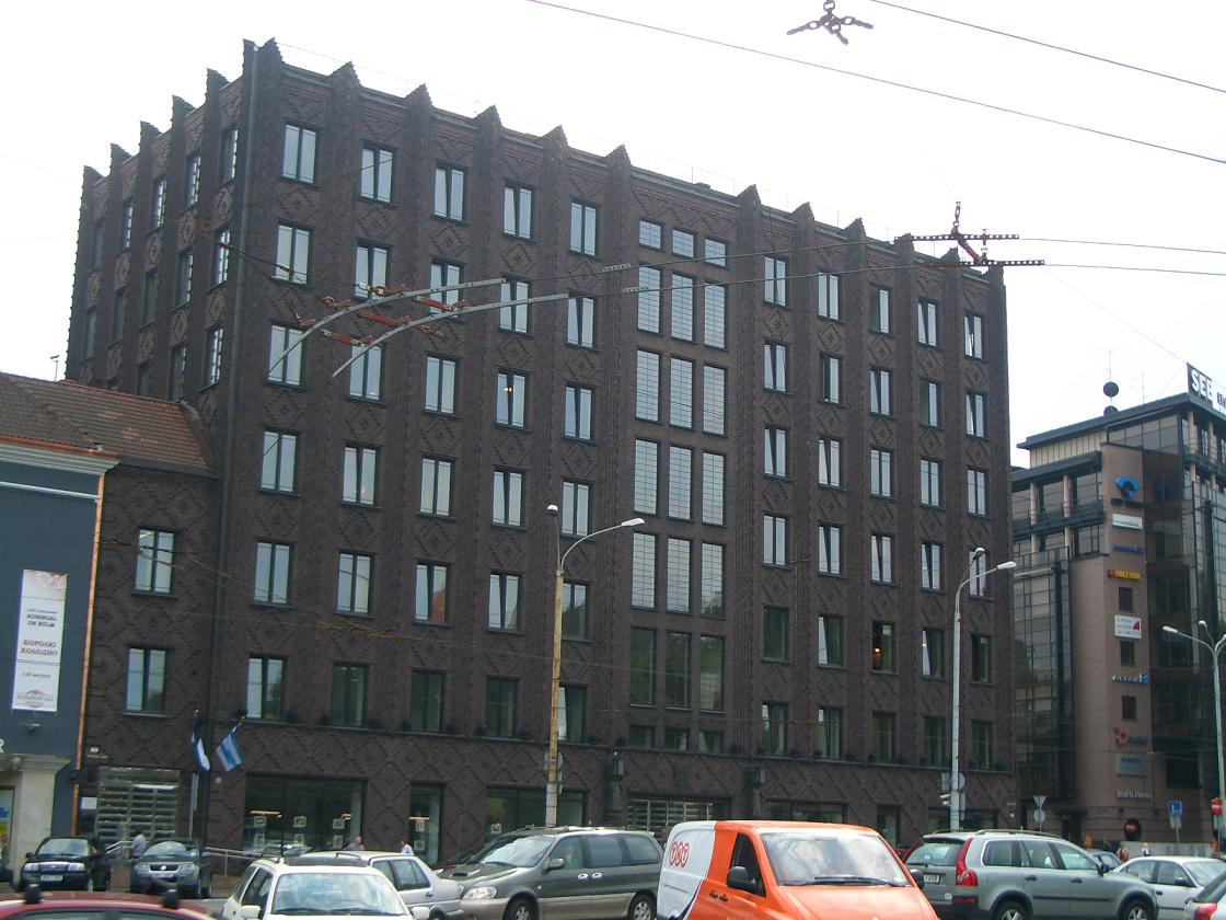 Linnavalitsus